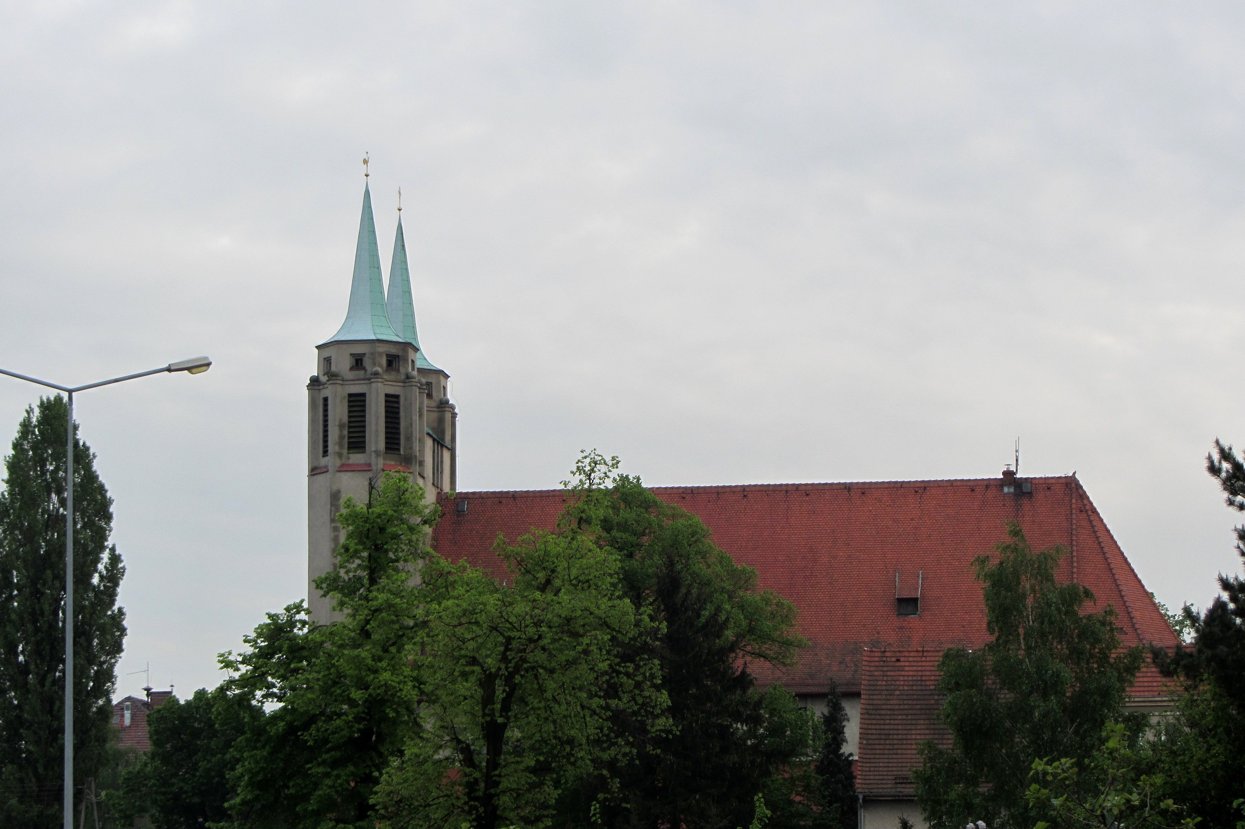 Opole Szczepanowice - kościół parafialny pw. św. Józefa, 1928-1929